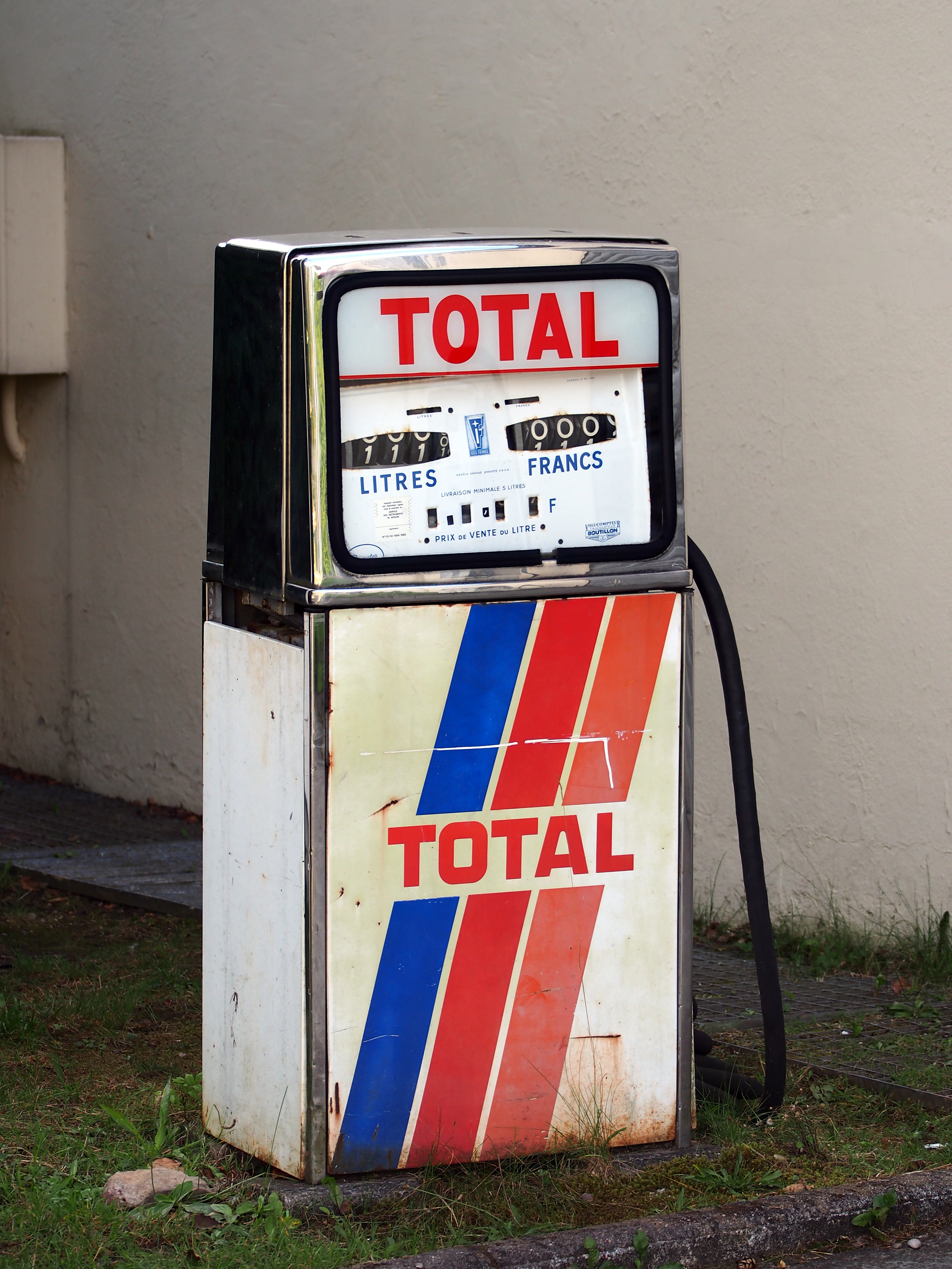 Photographed at the Association Lorraine des Amateurs d'Automobiles de collection et de loisirs.